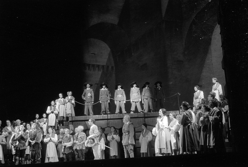 Original image description from the Deutsche Fotothek Szenenbilder